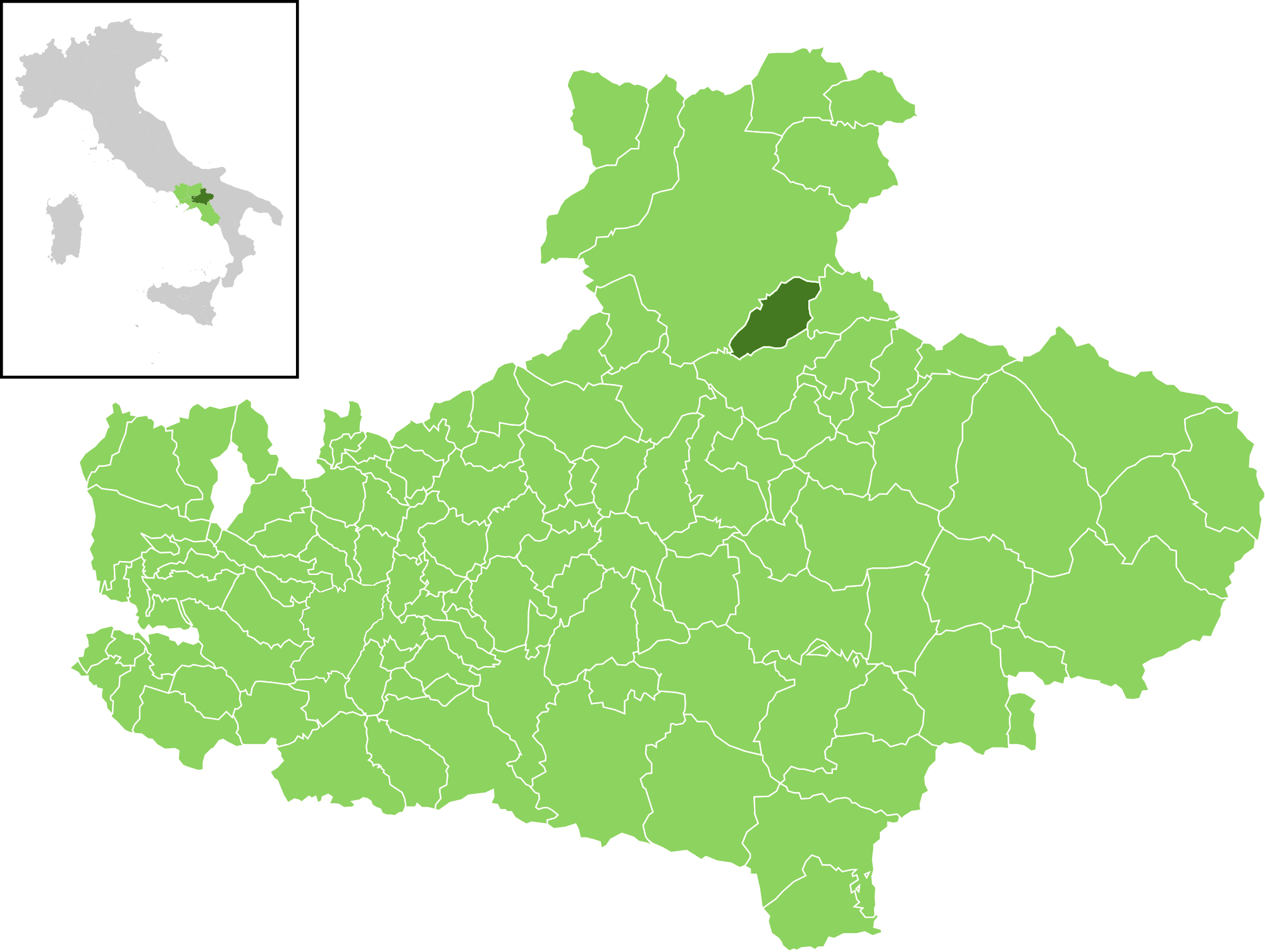 Posizione del comune all'interno della provincia di Avellino